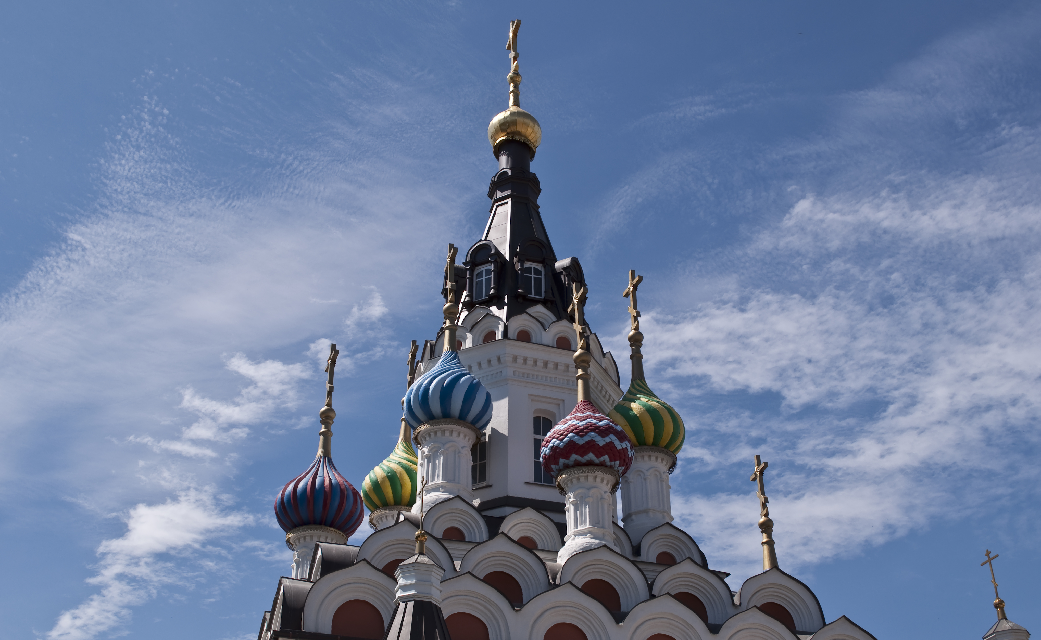 Утоли мои печали, действующий храм